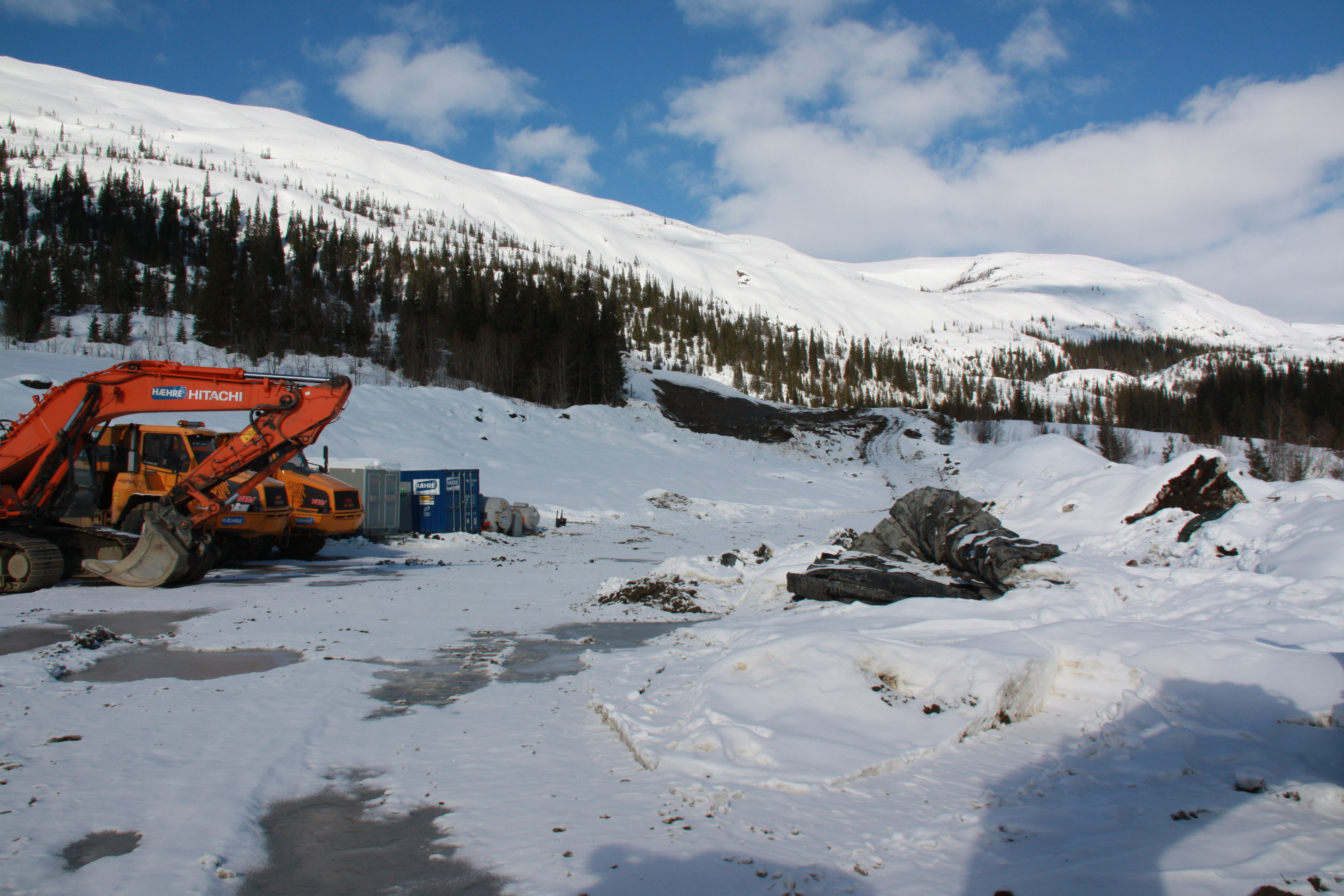 Anleggsområde for Toventunnelen